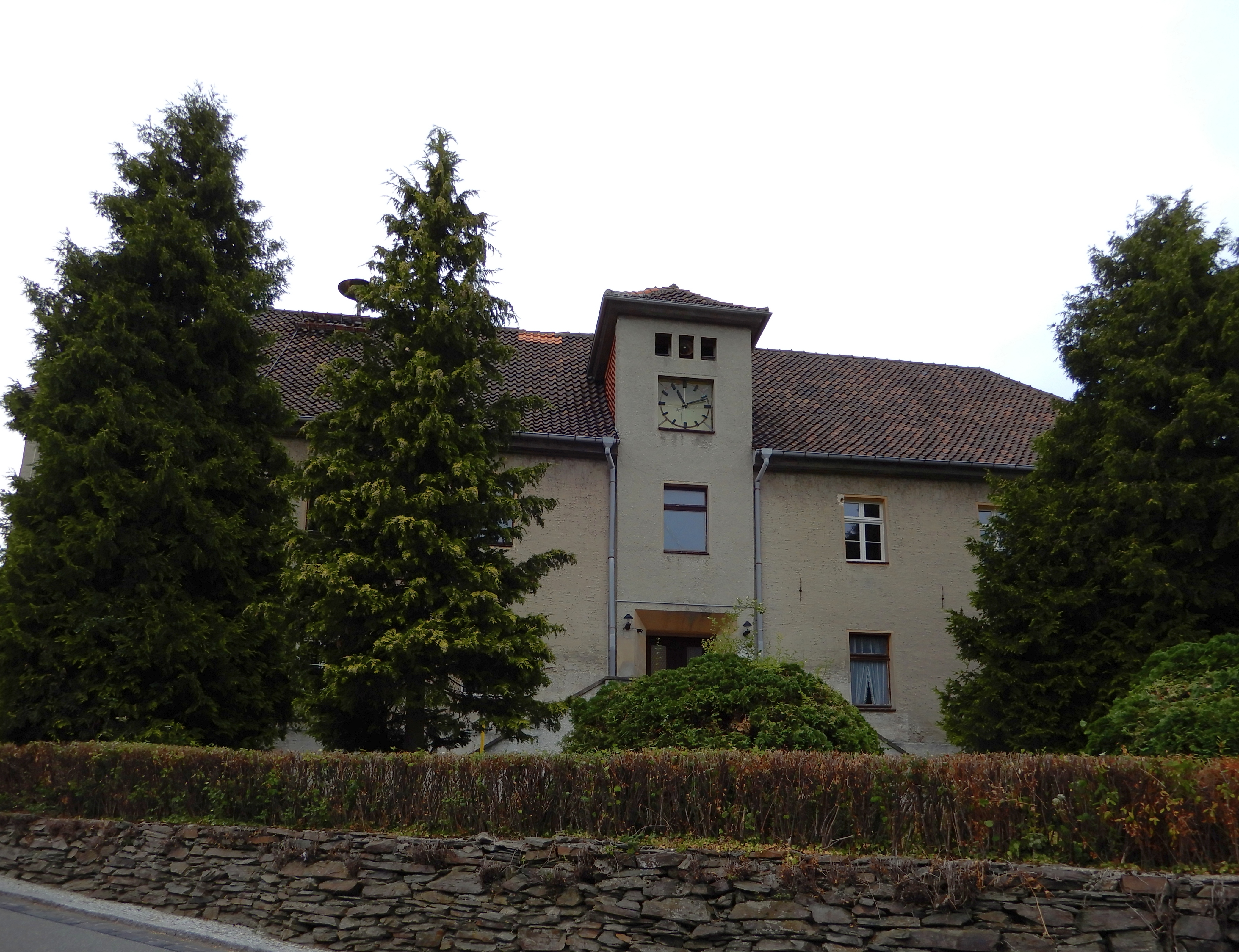 Gutshof Siptenfelder Straße 125, Friedensstraße 105